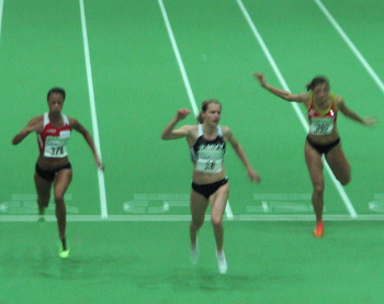 Deutsche Leichtathletik-Hallenmeisterschaften 2013, 60-Meter-Finale, Tatjana Pinto, Verena Sailer, Inna Weit